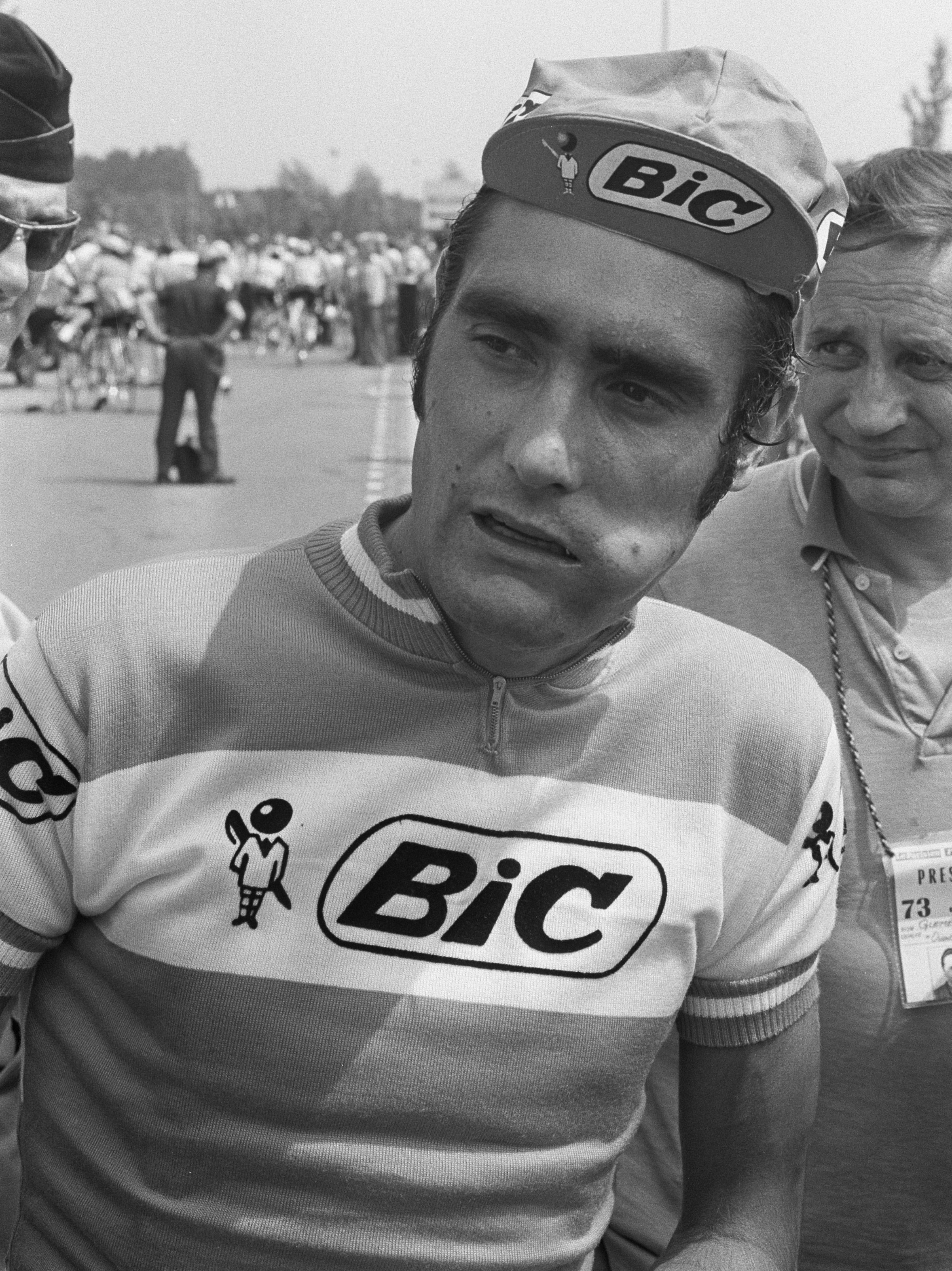 Collectie / Archief : Fotocollectie Anefo Reportage / Serie : [ onbekend ] Beschrijving : Tour de France, Luis Ocaña Datum : 2 juli 1973 Locatie : Rotterdam, Zuid-Holland Trefwoorden : sport, wielrennen Persoonsnaam : Ocana Luis Instellingsnaam : Tour de France Fotograaf : Verhoeff, Bert / Anefo Auteursrechthebbende : Nationaal Archief Materiaalsoort : Negatief (zwart/wit) Nummer archiefinventaris : bekijk toegang 2.24.01.05 Bestanddeelnummer : 926-5233